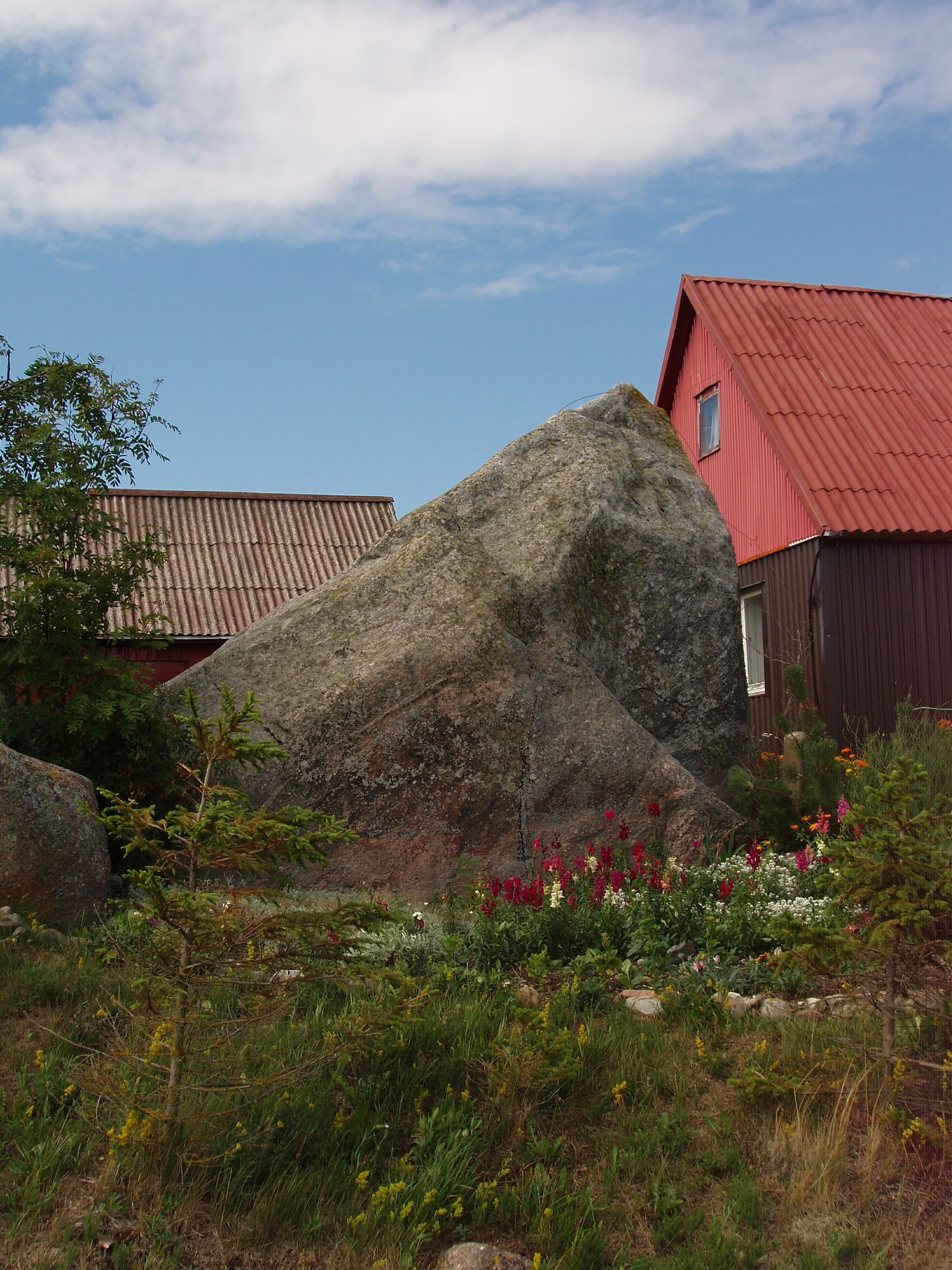 Manija Kokkõkivi